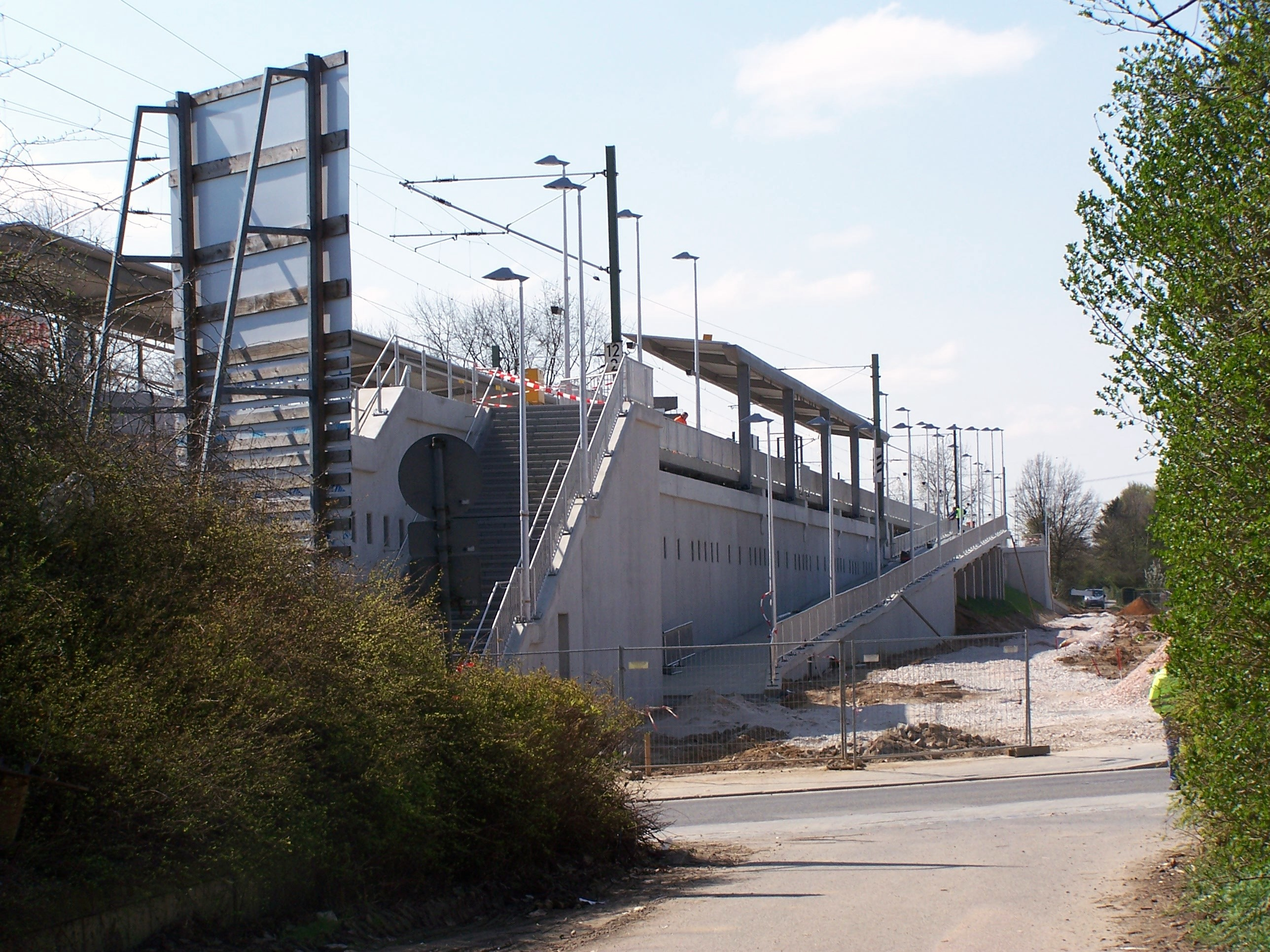 Bauarbeiten an der S-Bahnstation Frankfurt-Zeilsheim